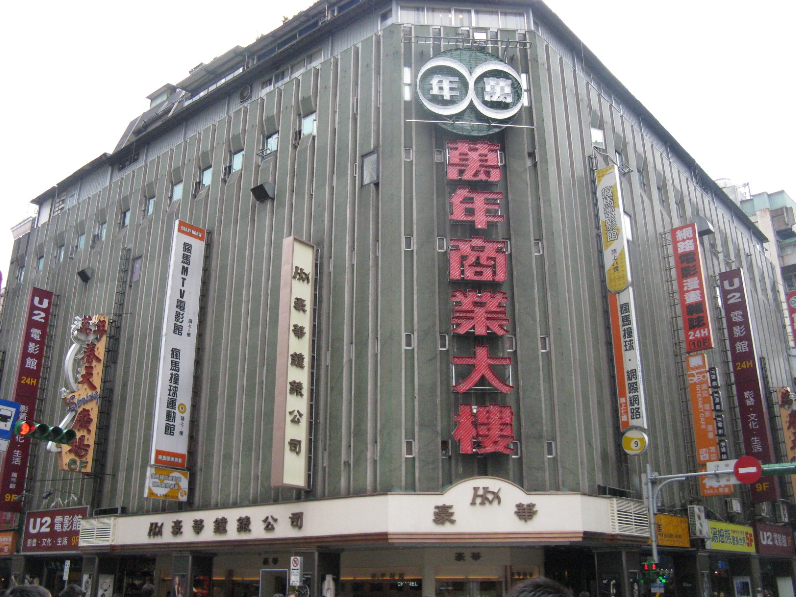 台北市万華区の万年商業大楼。